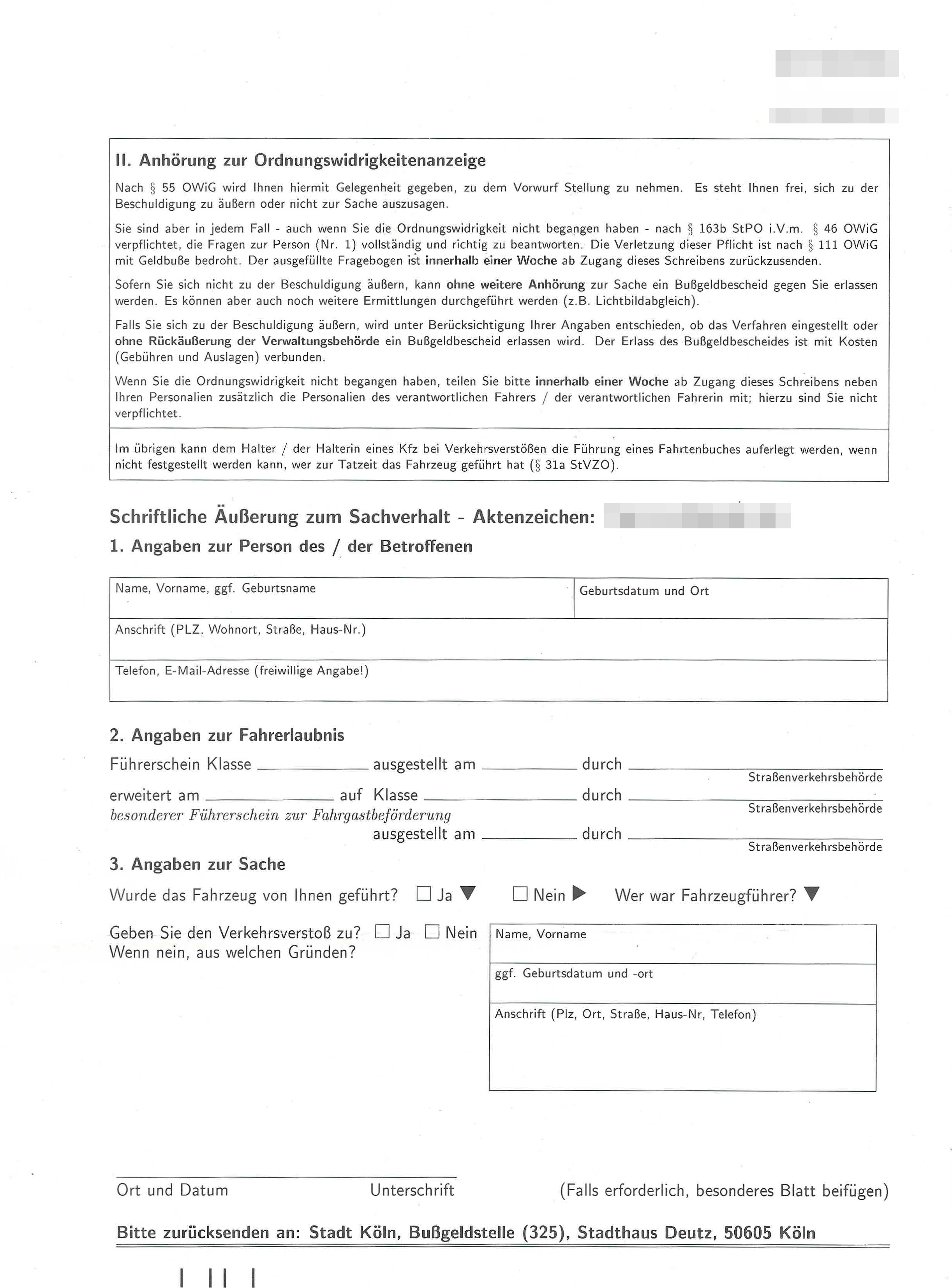 Anhörungsbogen zu einer Ordnungswidrigkeitenanzeige der Bußgeldstelle der Stadt Köln